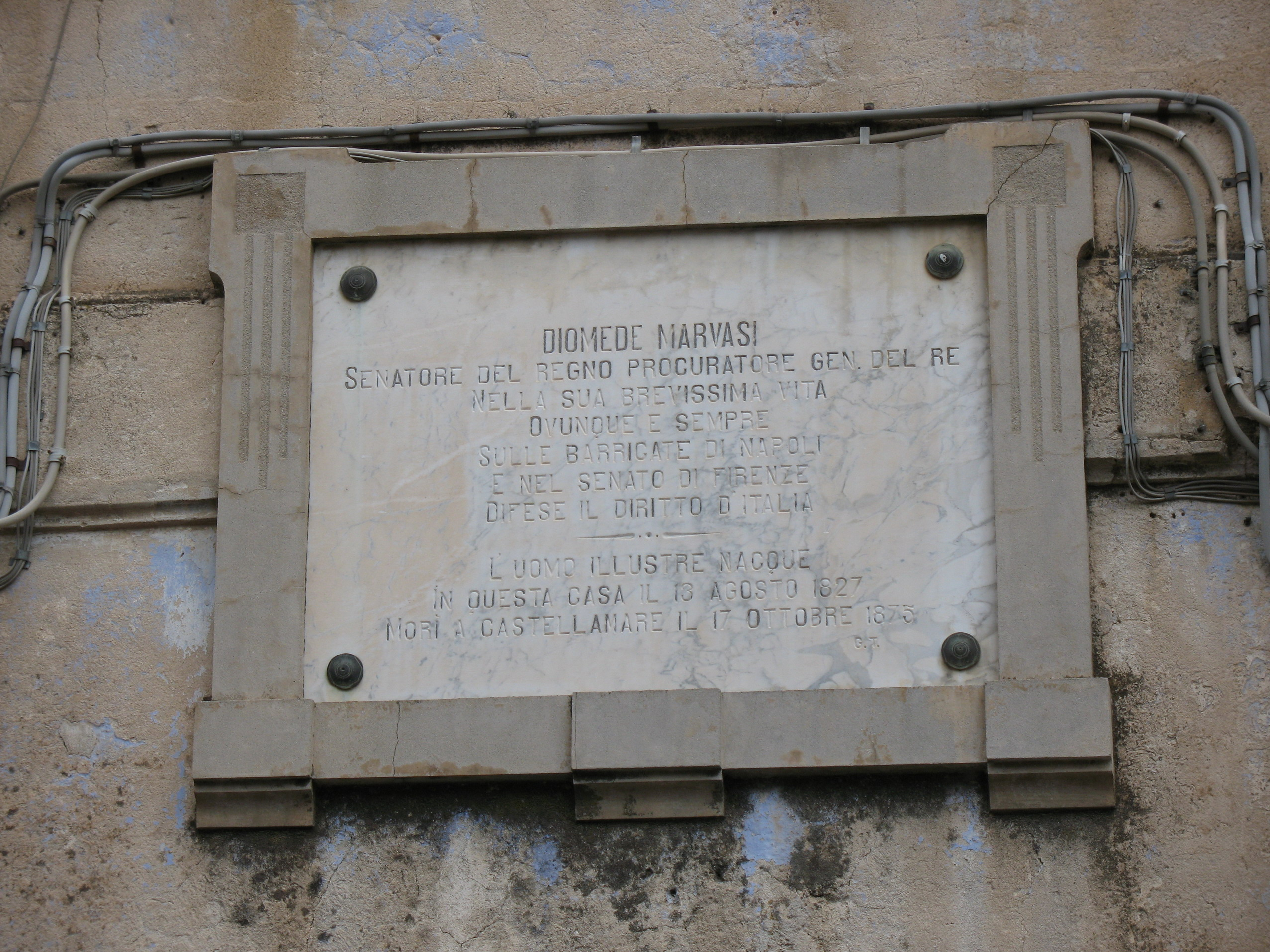 Foto della targa commemorativa posta il 1º gennaio 1925 sulla casa natale di Diomede Marvasi a Cittanova. L'epigrafe fu dettata dall'avvocato Giuseppe Tarsitani